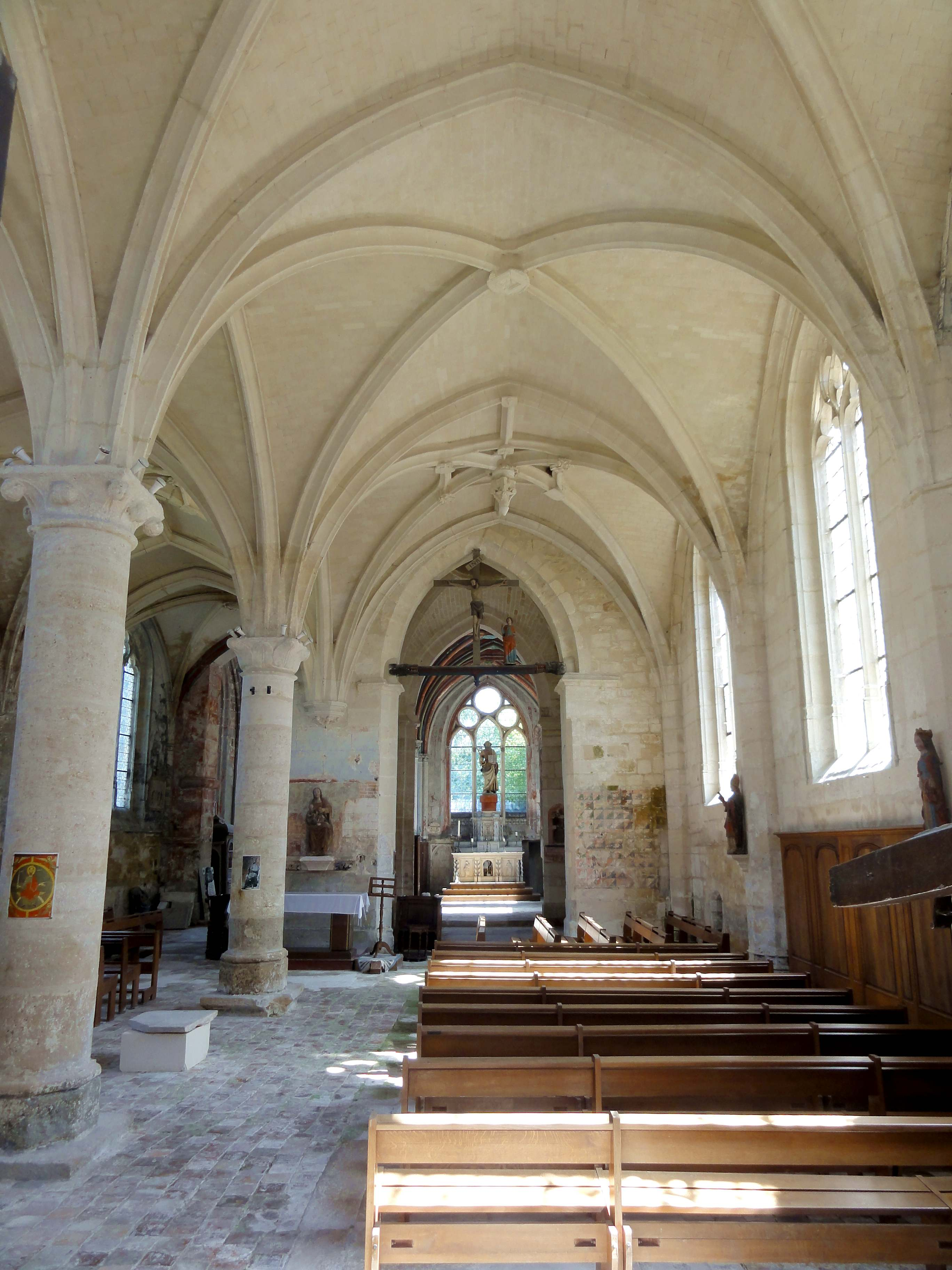 Intérieur de l'église (voir titre).